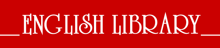 Логотип серії "English Library"